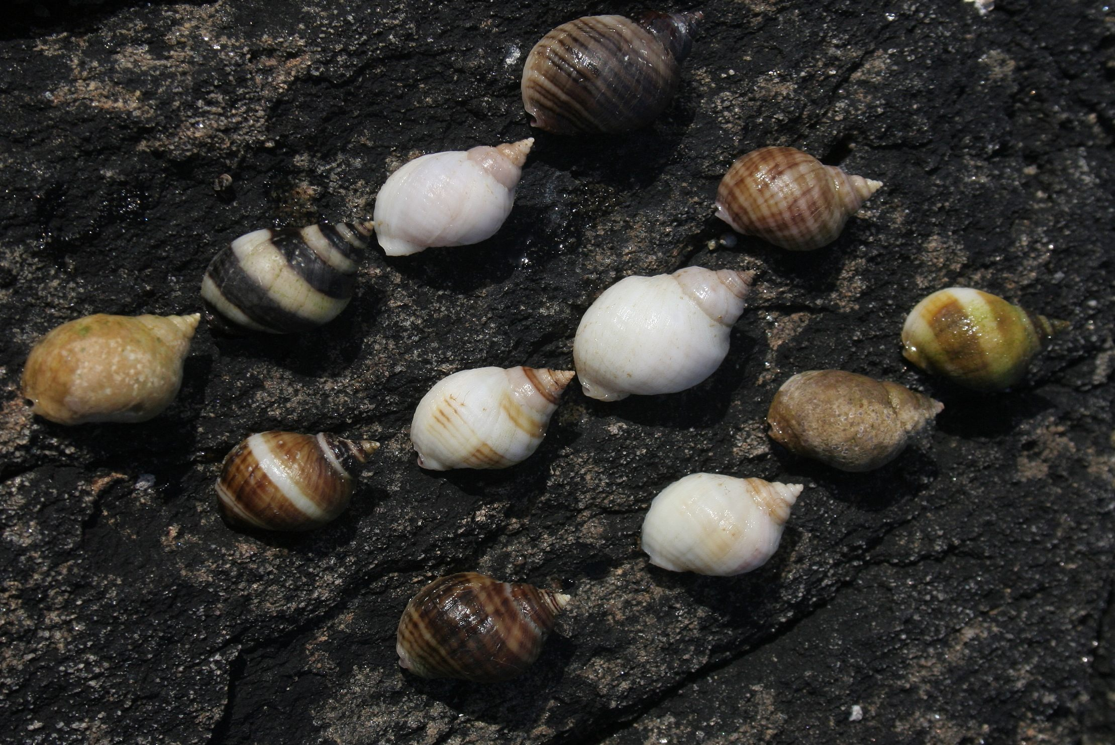 les véritables propriétaires (Nucella lapillus) reprennent possession de la rade après Brest 2008